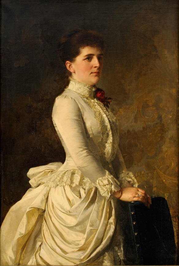 Damenportrait (Marie Vorster)